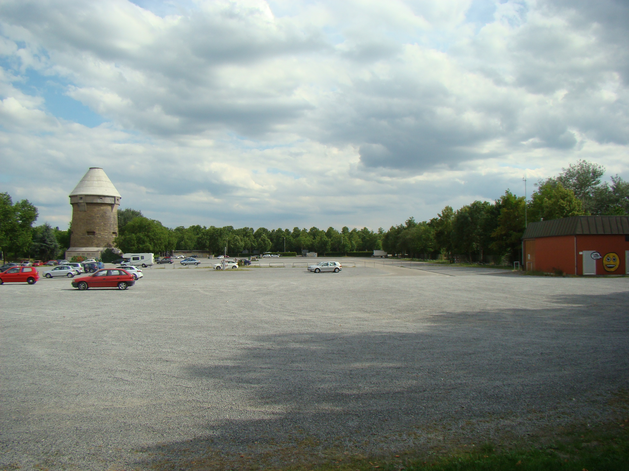 Theresienwiese in Heilbronn, mit (umbenannt 2016:) Theresienturm, Blick vom geschotterten Teil nach Osten